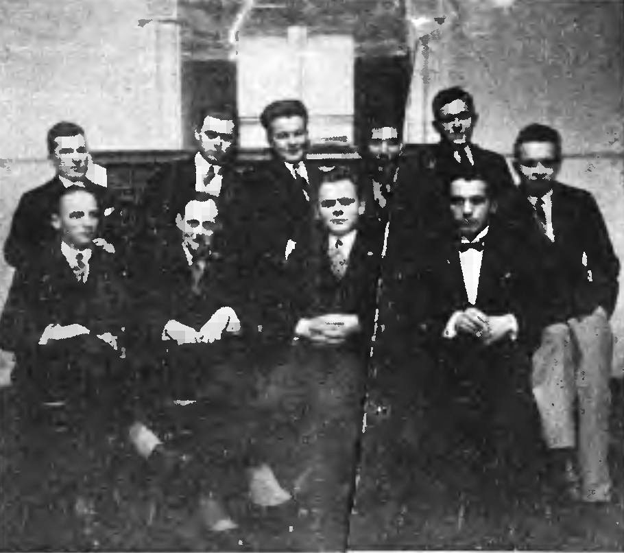 skan czasopisma PL, Wiadomości Literackie 5 XII 1937 nr 50 (736) Numer specjalny poświęcony Zbigniewowi Uniłowskiemu. Grupa „Kwadrygi”; siedzą od lewej do prawej: Stefan Flukowski, St. M. Saliński, St. R. Dobrowolski, Władysław Sebyła, Lucjan Szenwald. Stoją: Marjan Piechał, Aleksander Maliszewski, Henryk Ładosz, Andrzej Wolica, Zbigniew Uniłowski.